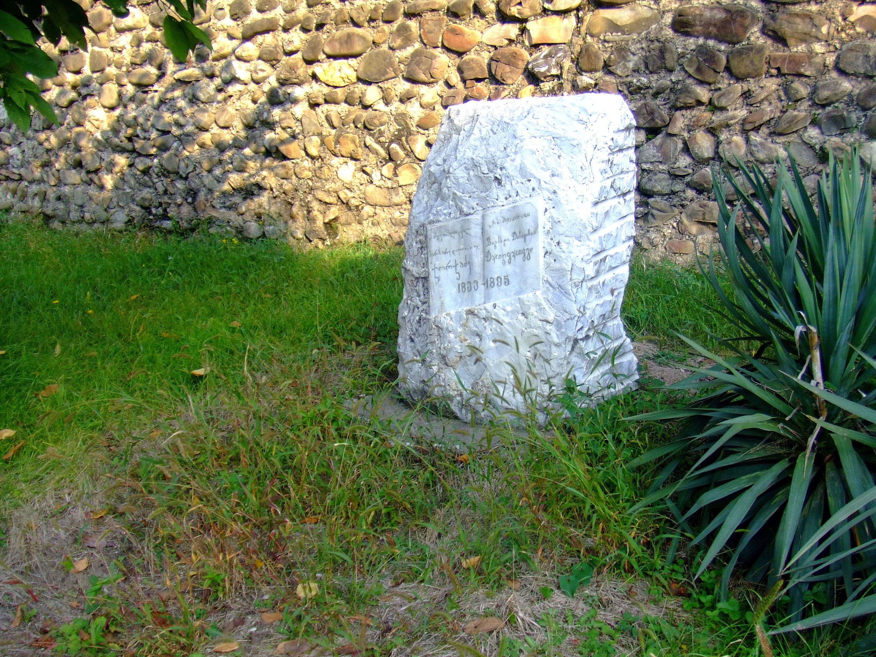 ჯორჯაძე ბარბარე